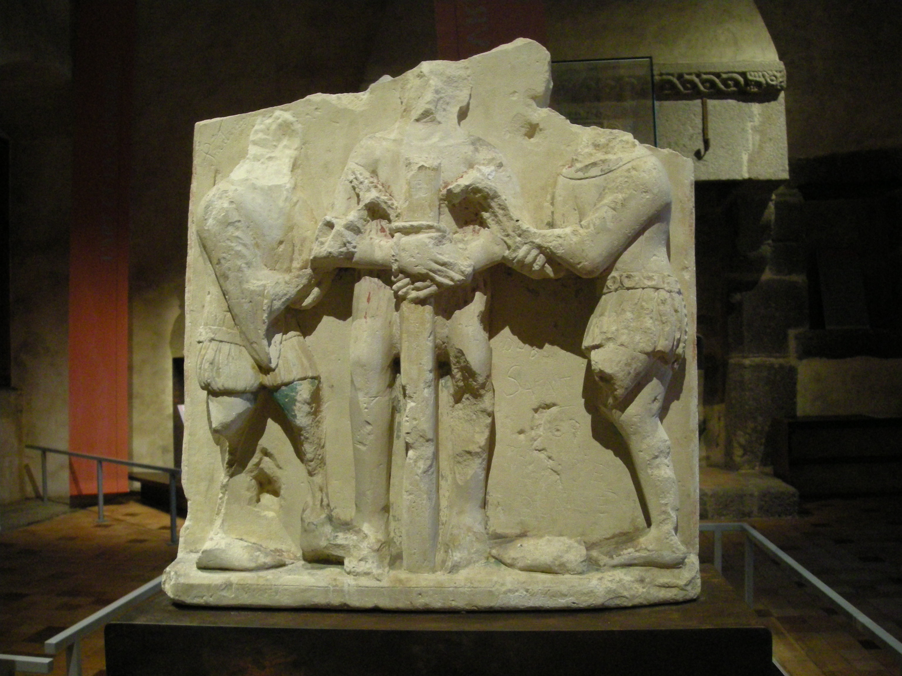 Martyre de saint Blaise en calcaire (en provenance de la chapelle d'Appeville), présentée dans le cadre de l'exposition "Fragments d'Histoire" à l'abbaye de Hambye (Normandie)